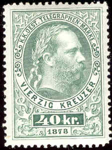 Telegrafenmarke 1874 Quelle: selbst erstellt